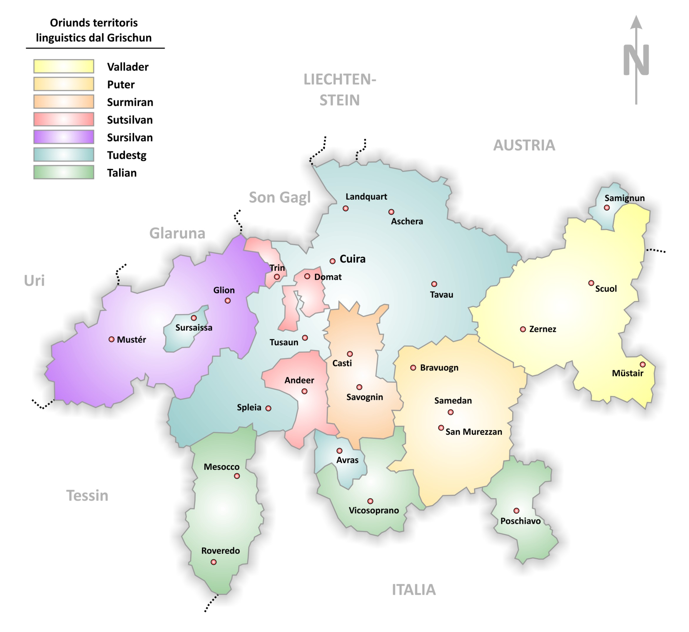 Rumantsch: Oriunds territoris linguistics dal Grischun